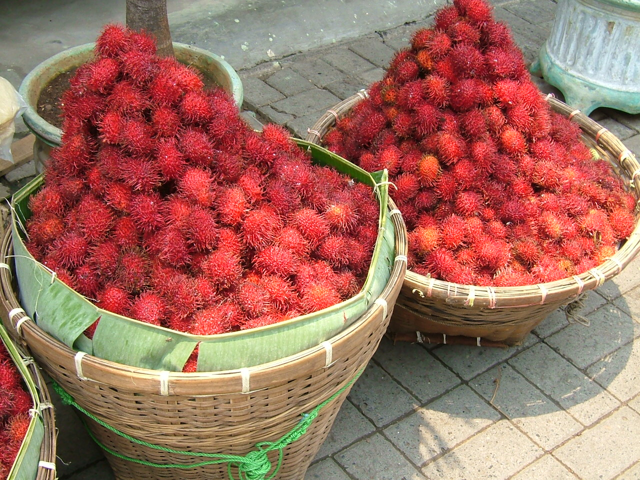 Rambutan Binjai at a fruit stall in Pasar Baru, Jakarta, Indonesia